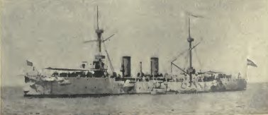 Crucero acorazado 25 de Mayo